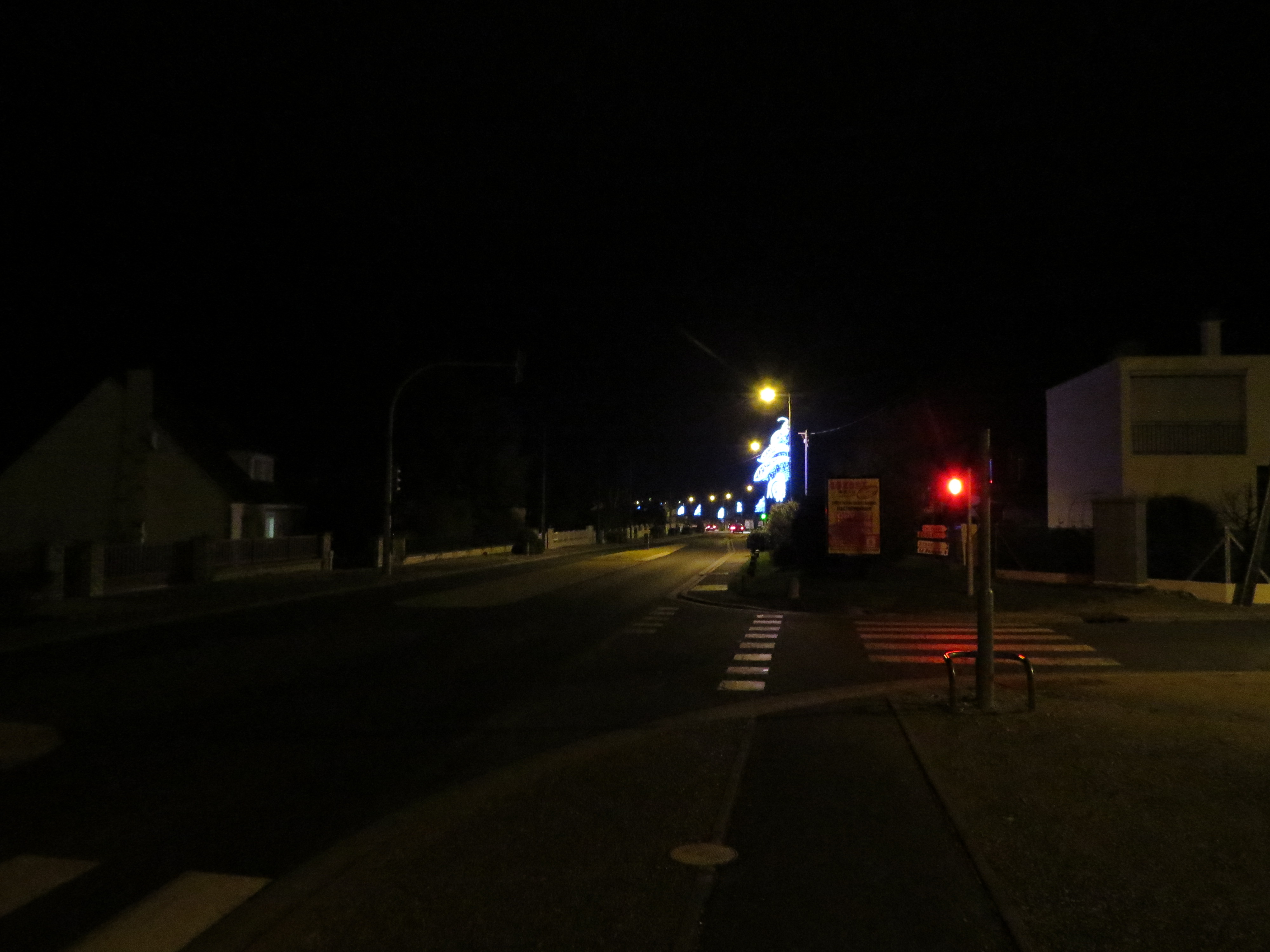 Décoration de Noël à Darvault (77)